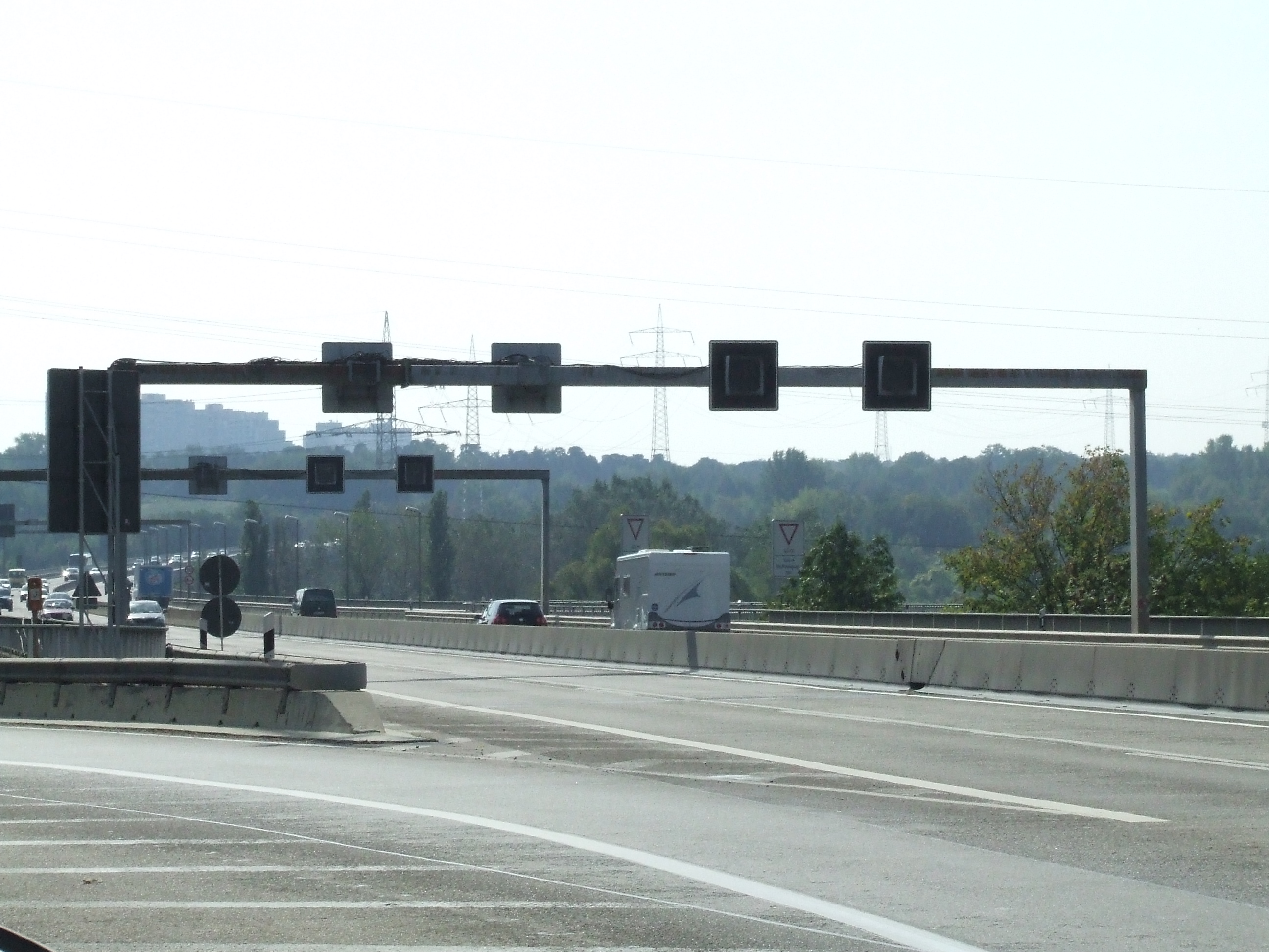 Bridges between Mainz and Wiesbaden - Schiersteiner Brücke zwischen Mainz und Wiesbaden